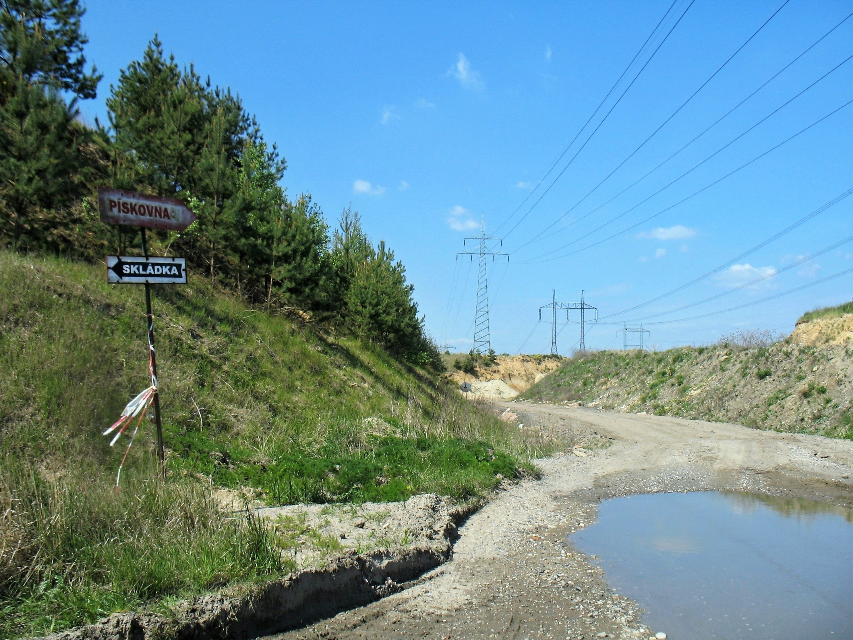 Přírodní památka Pískovna Žizníkov v České Lípě